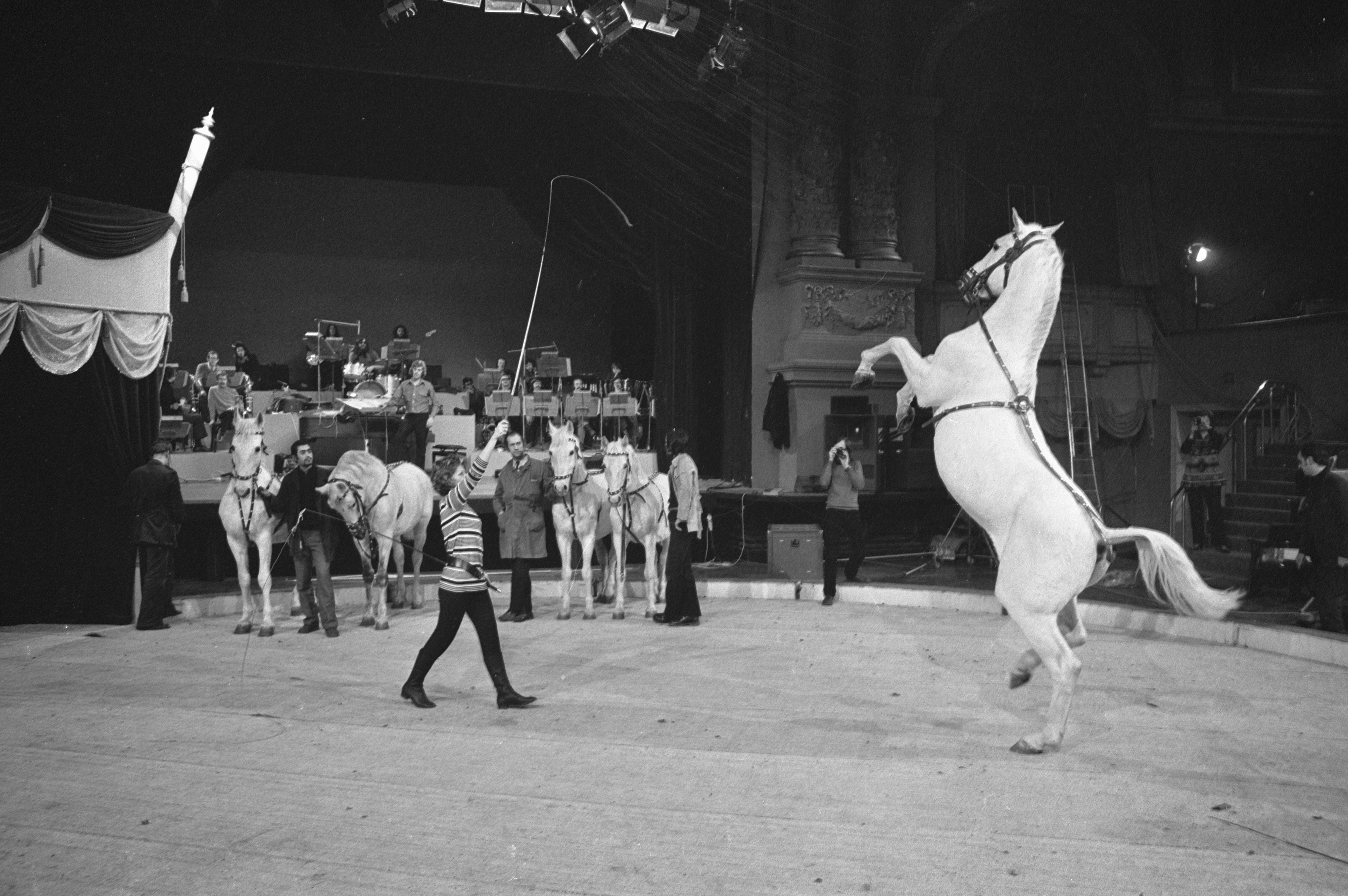 Collectie / Archief : Fotocollectie Anefo Reportage / Serie : [ onbekend ] Beschrijving : Artiesten treden op met circusnummers in Nationaal Songfestival in Carré, Amsterdam; tijdens repetitie Mieke Telkamp met paarden Datum : 15 februari 1972 Locatie : Amsterdam, Noord-Holland Trefwoorden : ARTIESTEN, PAARDEN, circussen Persoonsnaam : Telkamp, Mieke Instellingsnaam : Nationaal Songfestival Fotograaf : Verhoeff, Bert / Anefo, [onbekend] Auteursrechthebbende : Nationaal Archief Materiaalsoort : Negatief (zwart/wit) Nummer archiefinventaris : bekijk toegang 2.24.01.05 Bestanddeelnummer : 925-3869